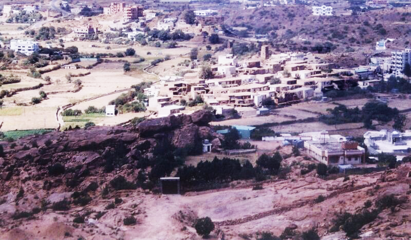 بلاد قبيلة حوالة